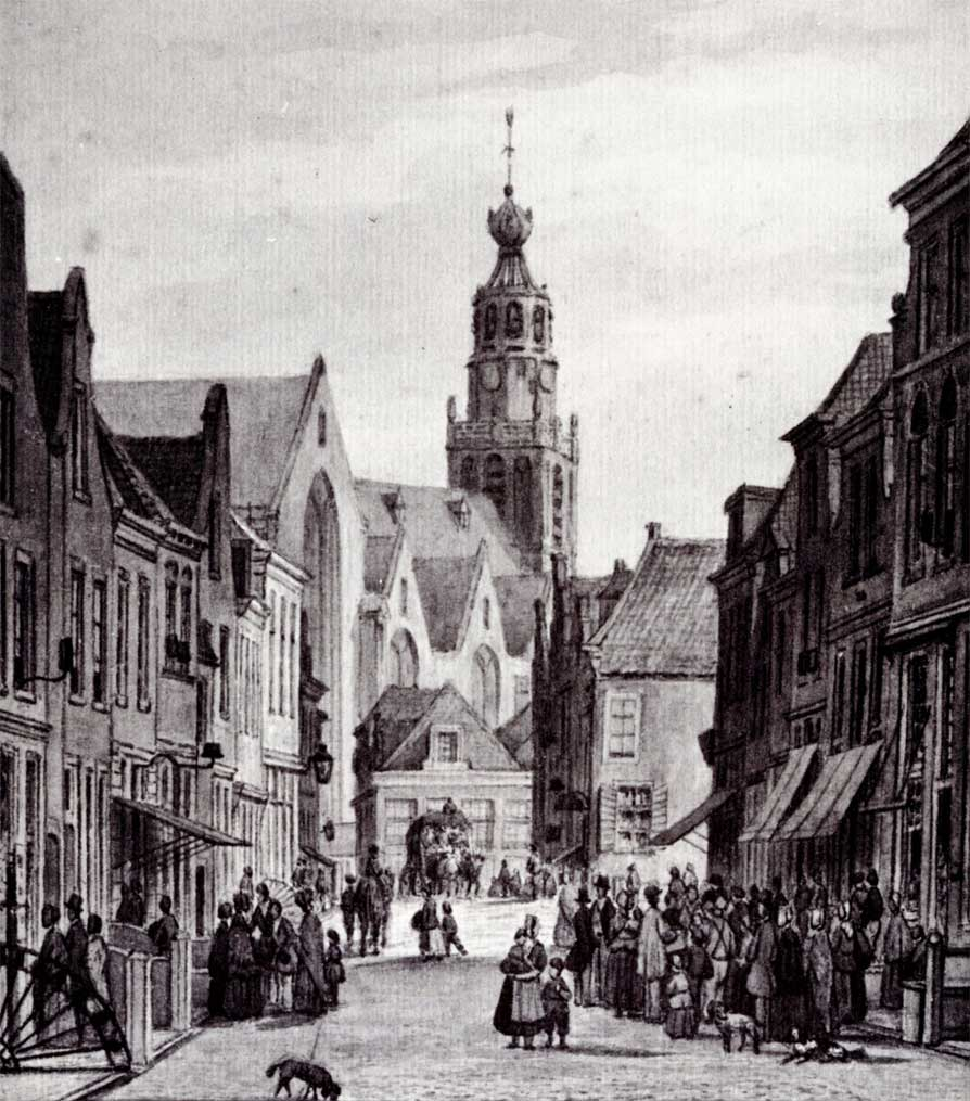 De Lange Tiendeweg te Gouda (aquarel)